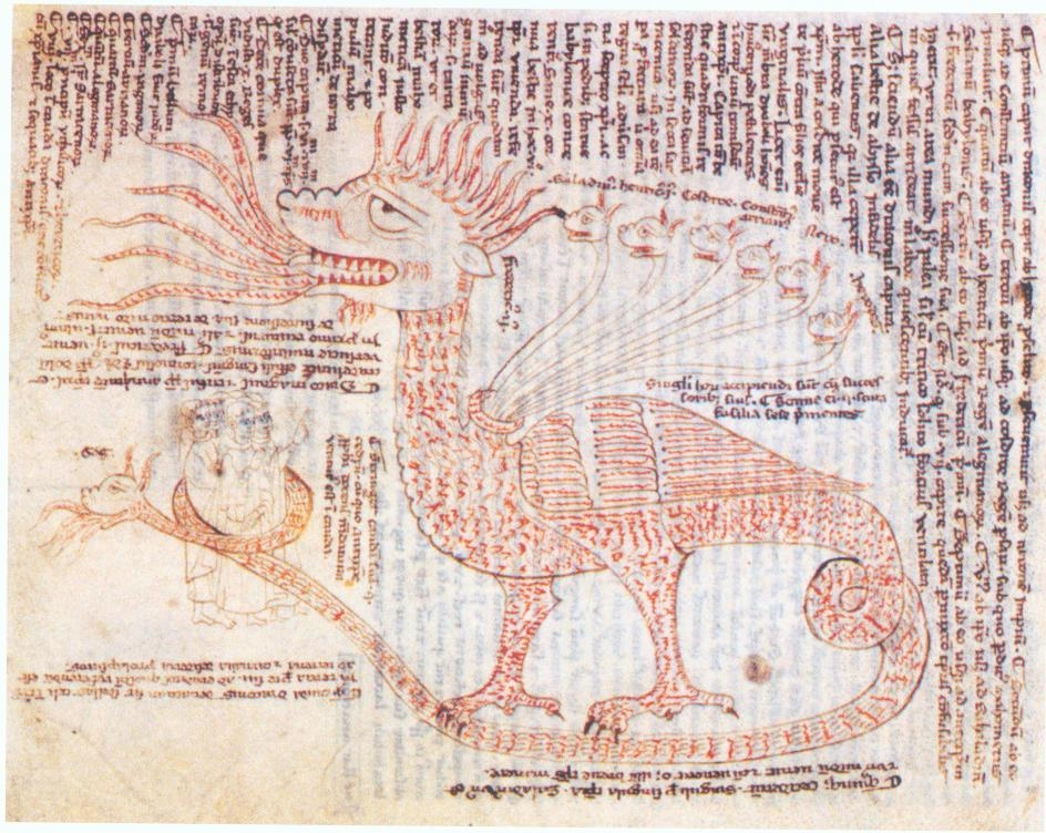 Darstellung Friedrichs_II. als siebenter Kopf des apokalyptischen Drachens.